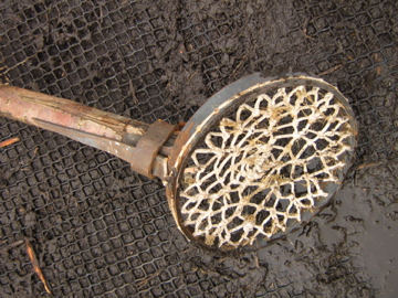 baguernette